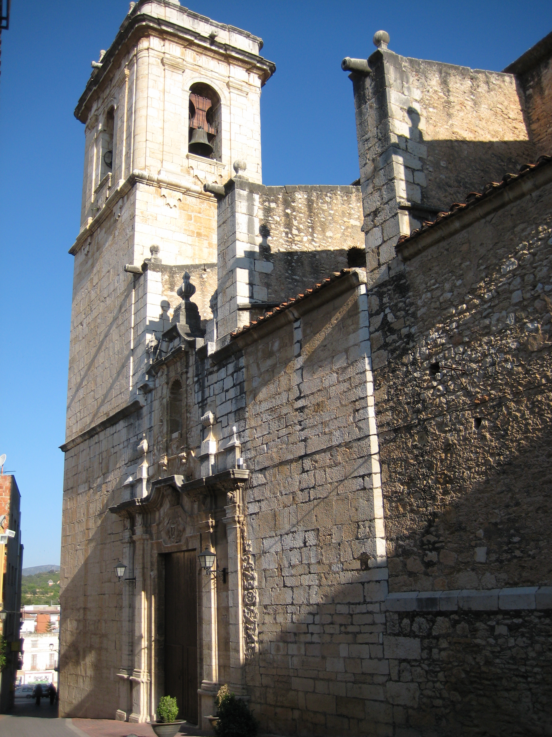 Església de Sant Llorenç de Càlig (Baix Maestrat)